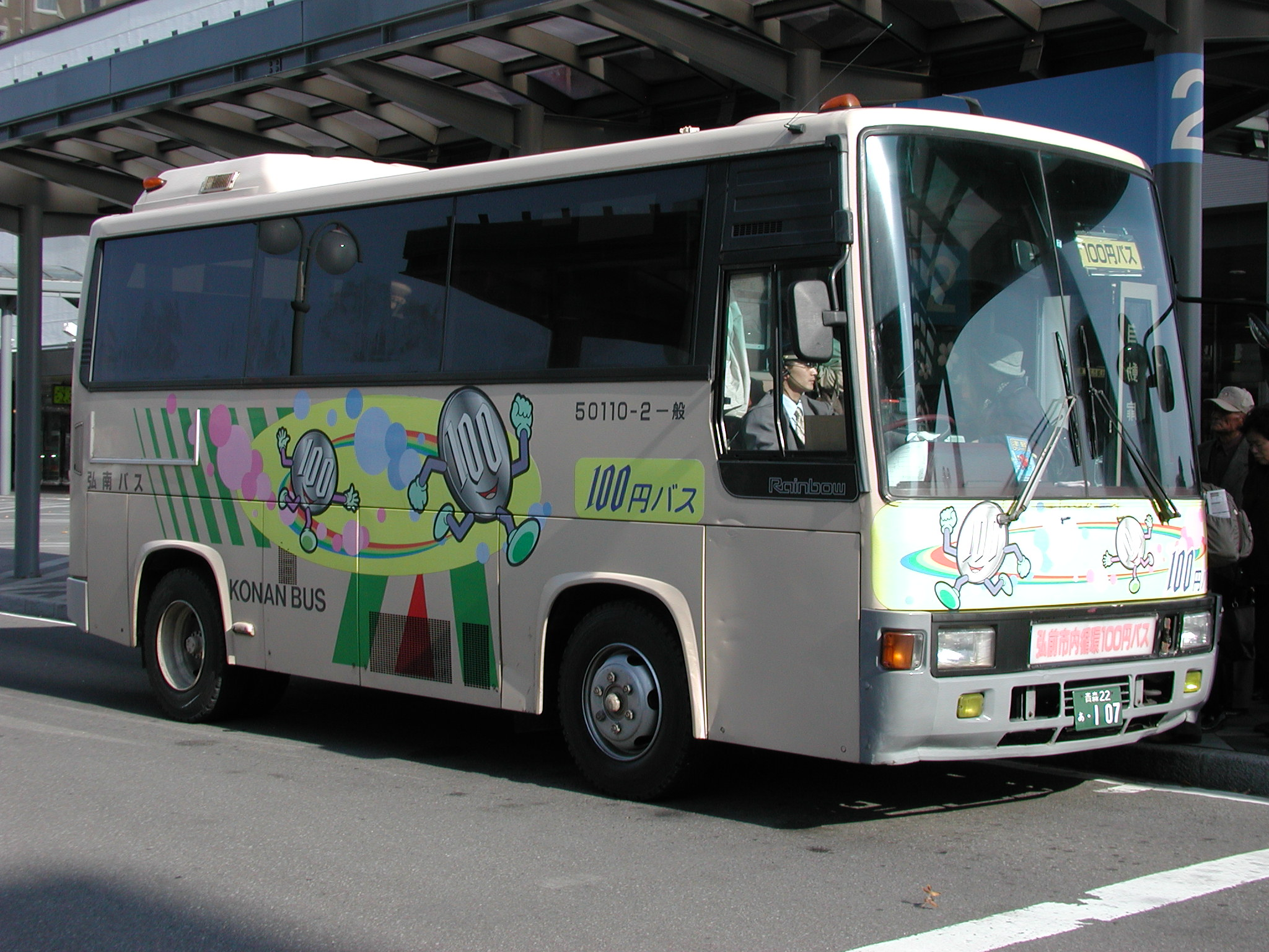 弘南バス一般路線現行塗装（日野・レインボー7M：P-CH160AA/社番：50110-2）：土手町循環100円バス専用車両 弘前駅中央口バスプールにて